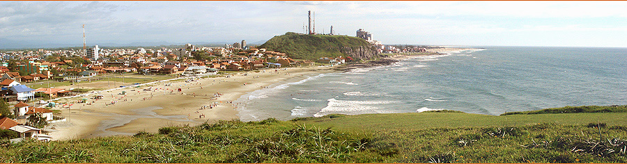 vista do litoral de Torres (Rio Grande do Sul, Brasil) a partir do Morro das Furnas, vendo-se em seqüência a Praia da Cal, depois o Morro do Farol, a Praia do Meio e por fim ao longe a Praia Grande.